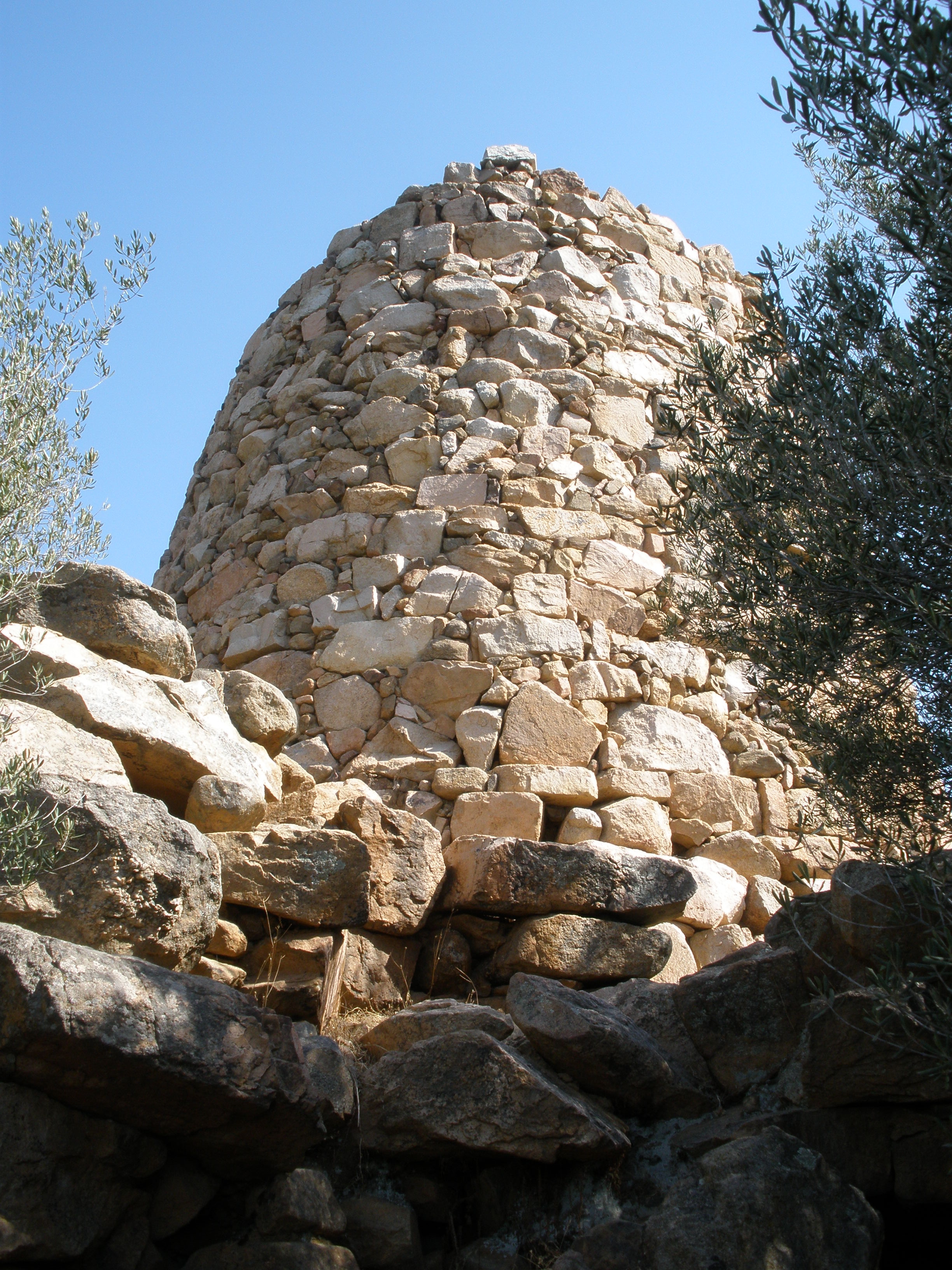 Nuraghe Asoru in der nähe von San Vito, Sardinien